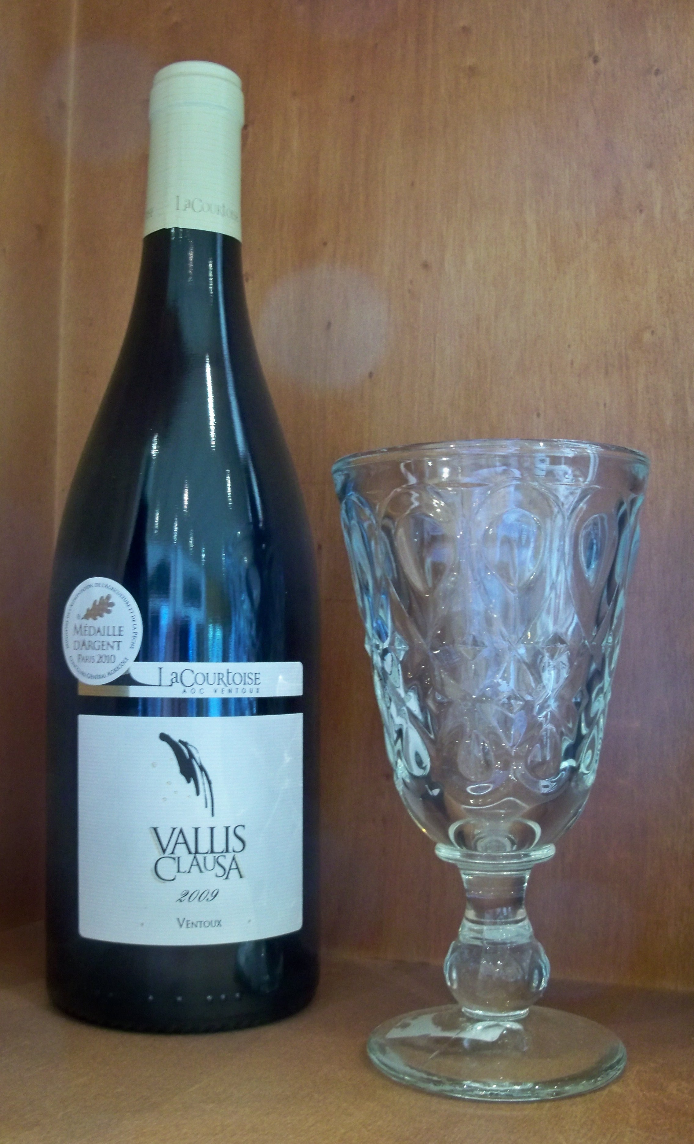 Bouteille de Vallis Clausa, Ventoux AOC